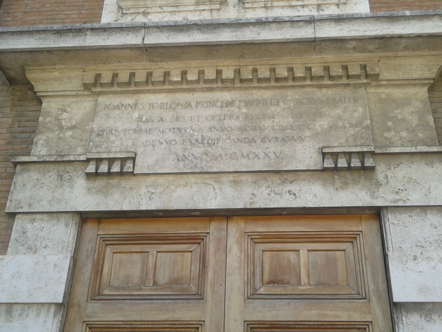 Iscrizione nella facciata interna del palazzo